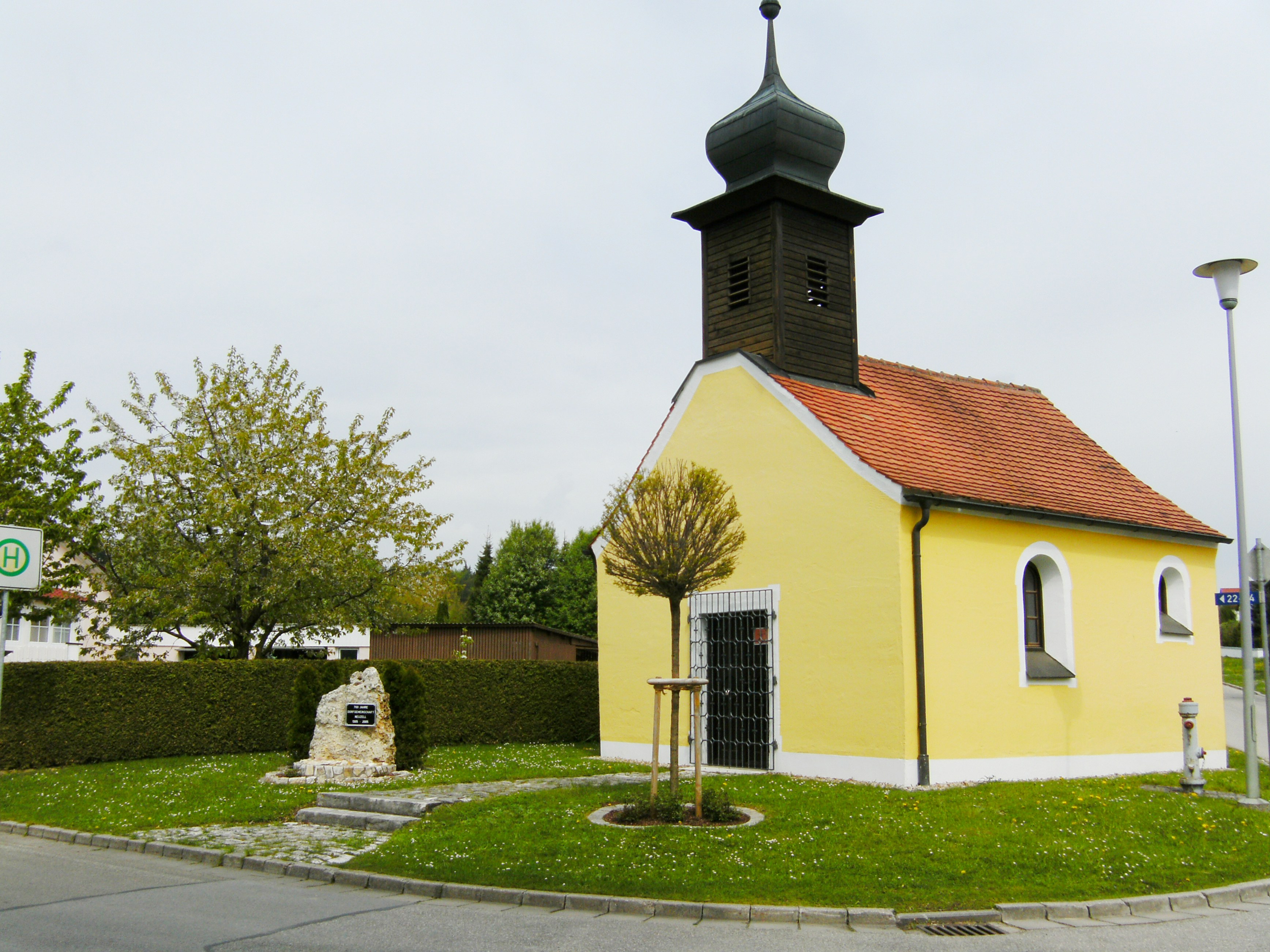 Dorfkapelle von Neuzell, Gemeindeteil der Stadt Beilngries im Landkreis Eichstätt, Bayern